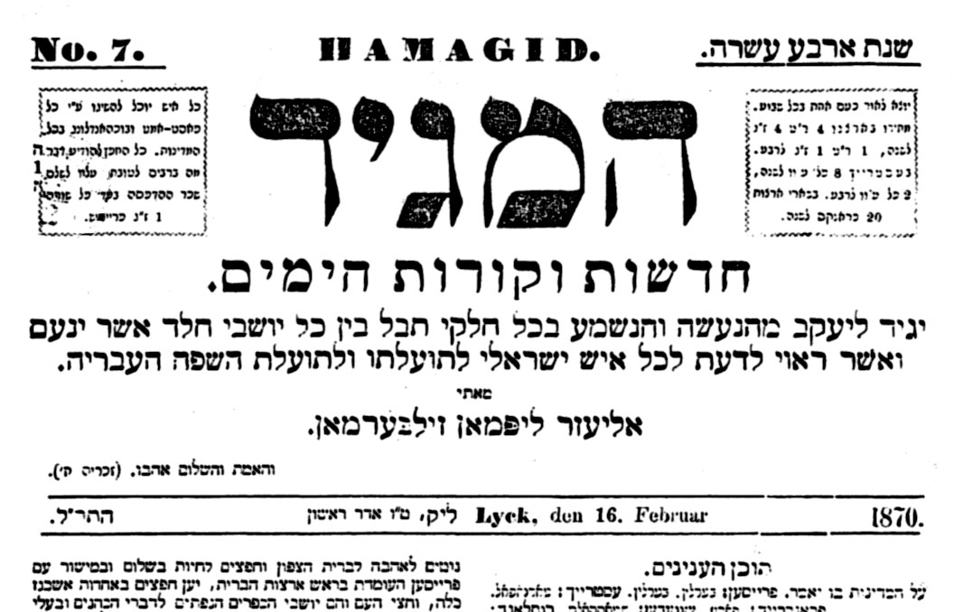 שער המגיד